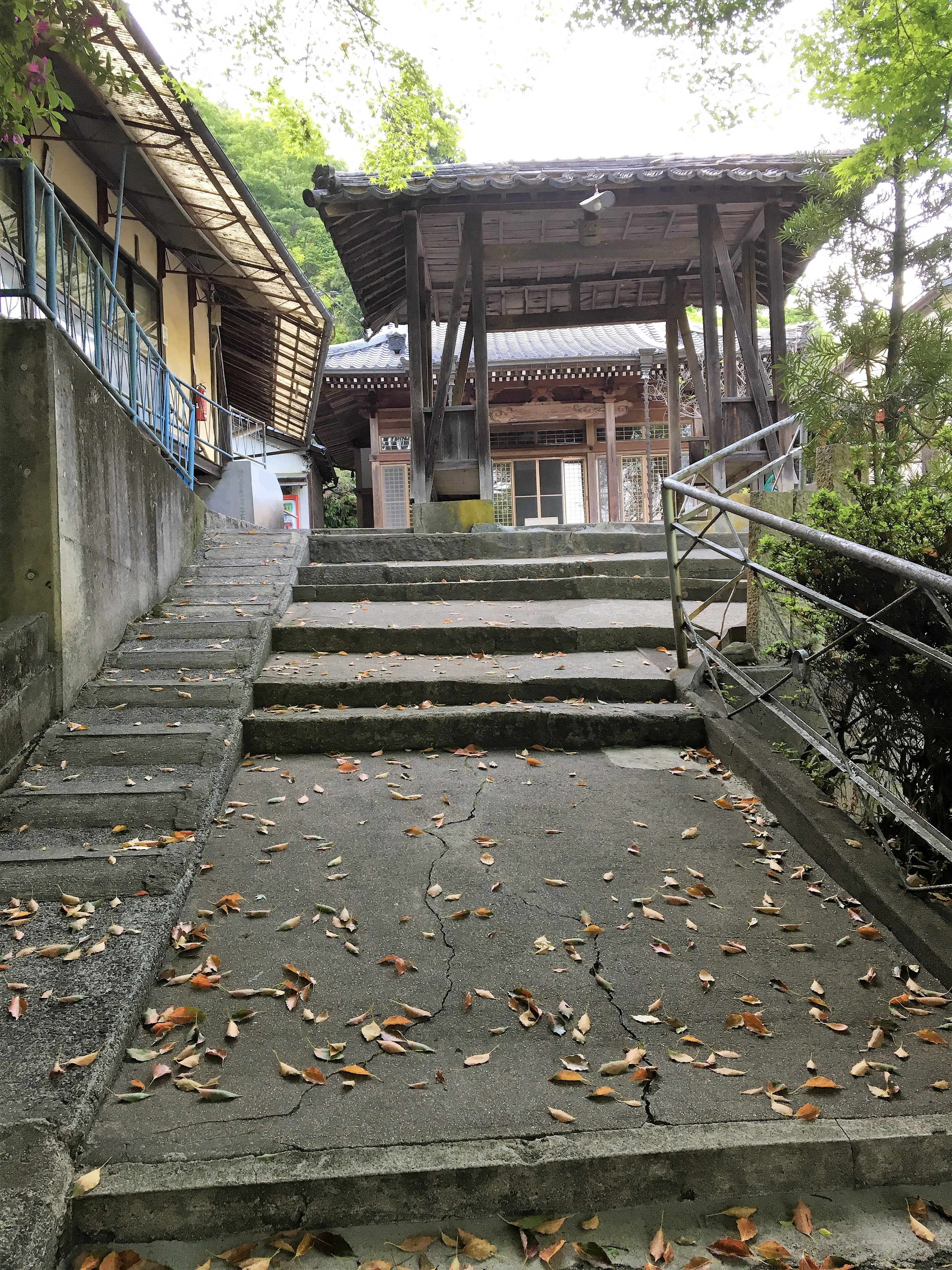 俄山弘法大師堂の山門と石段